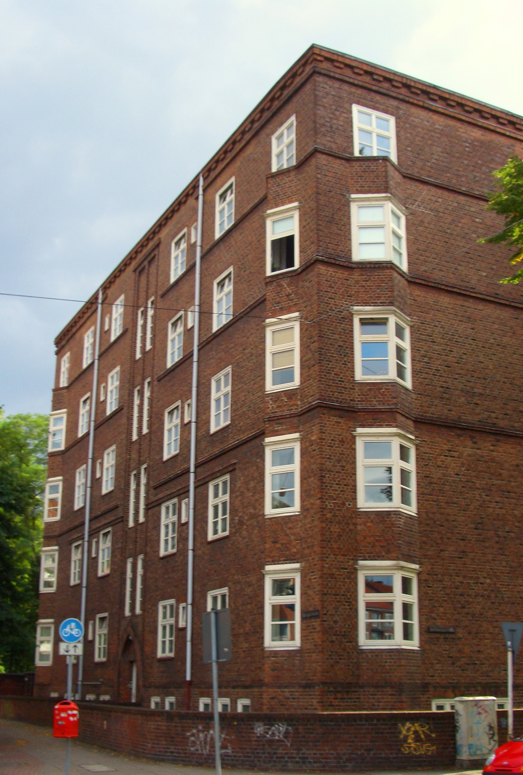 AOK-Gebäude in Hamburg-Borgfelde, Ostflügel, Archtekten:Distel & GrubitzThis is a photograph of an architectural monument.